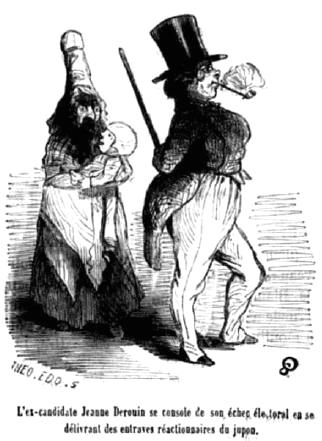 "L'ex-candidate Jeanne Derouin se console de son échec électoral en se délivrant des entraves réactionnaires du jupon".